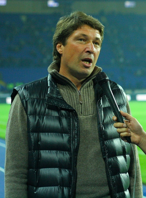 Yuriy Bakalov